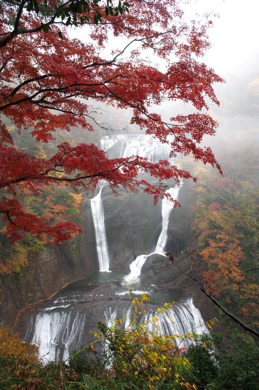 エレベータで上がった新観瀑台からの袋田の滝。